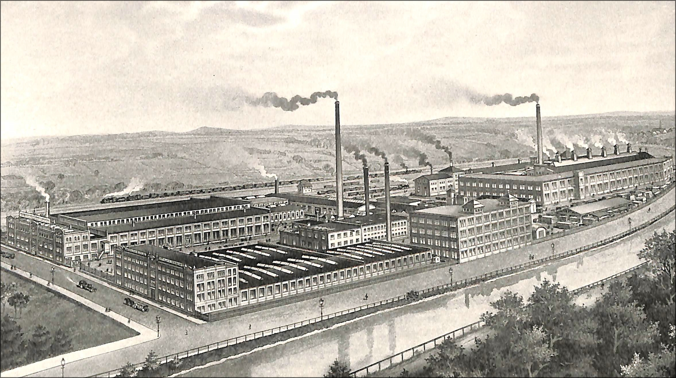 Plauen - (fiktive) Ansicht der Vogtl. Maschinenfabrik AG, vormals J.C. & H. Dietrich